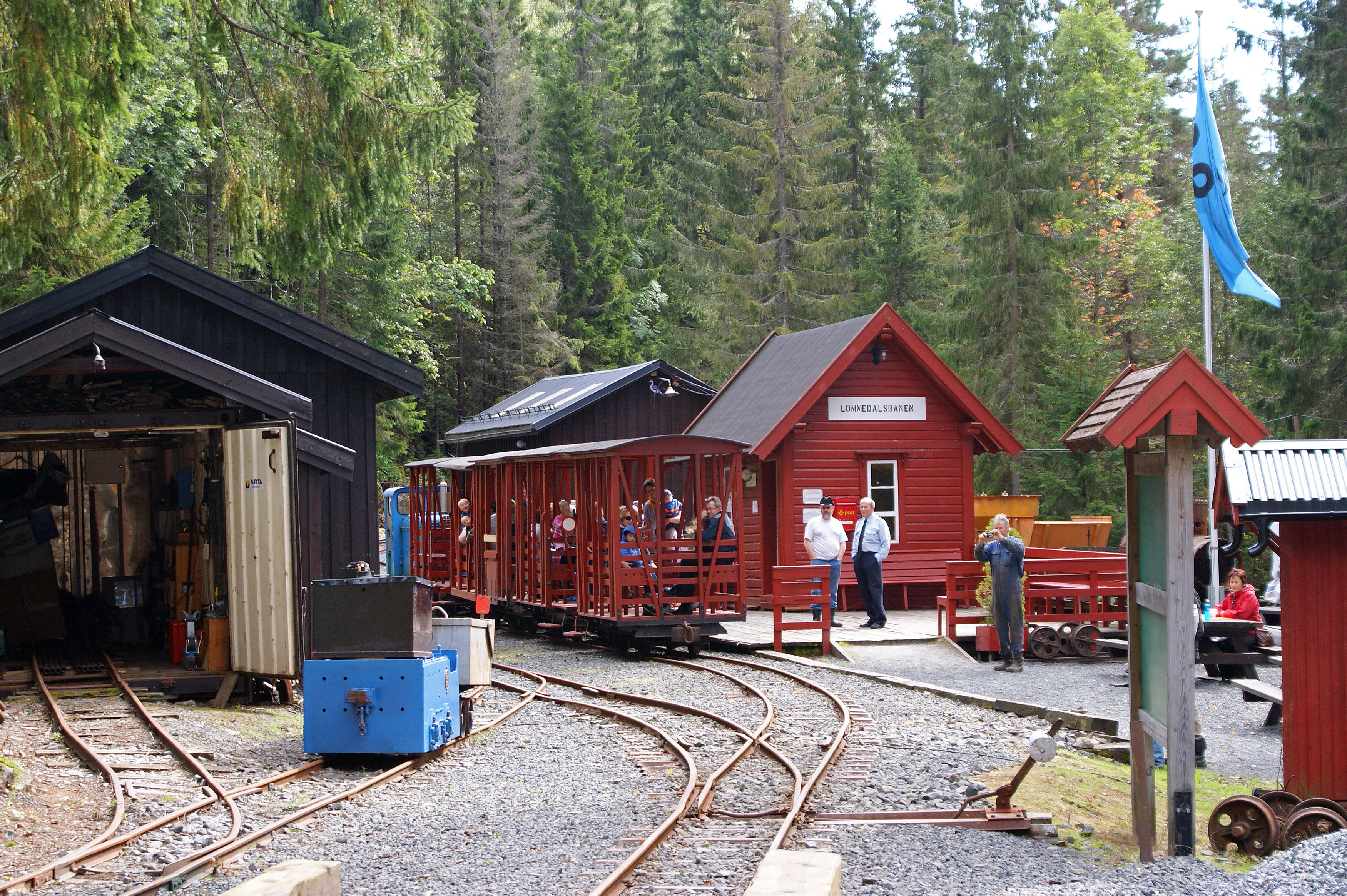 Lommedalsbanen august 2011